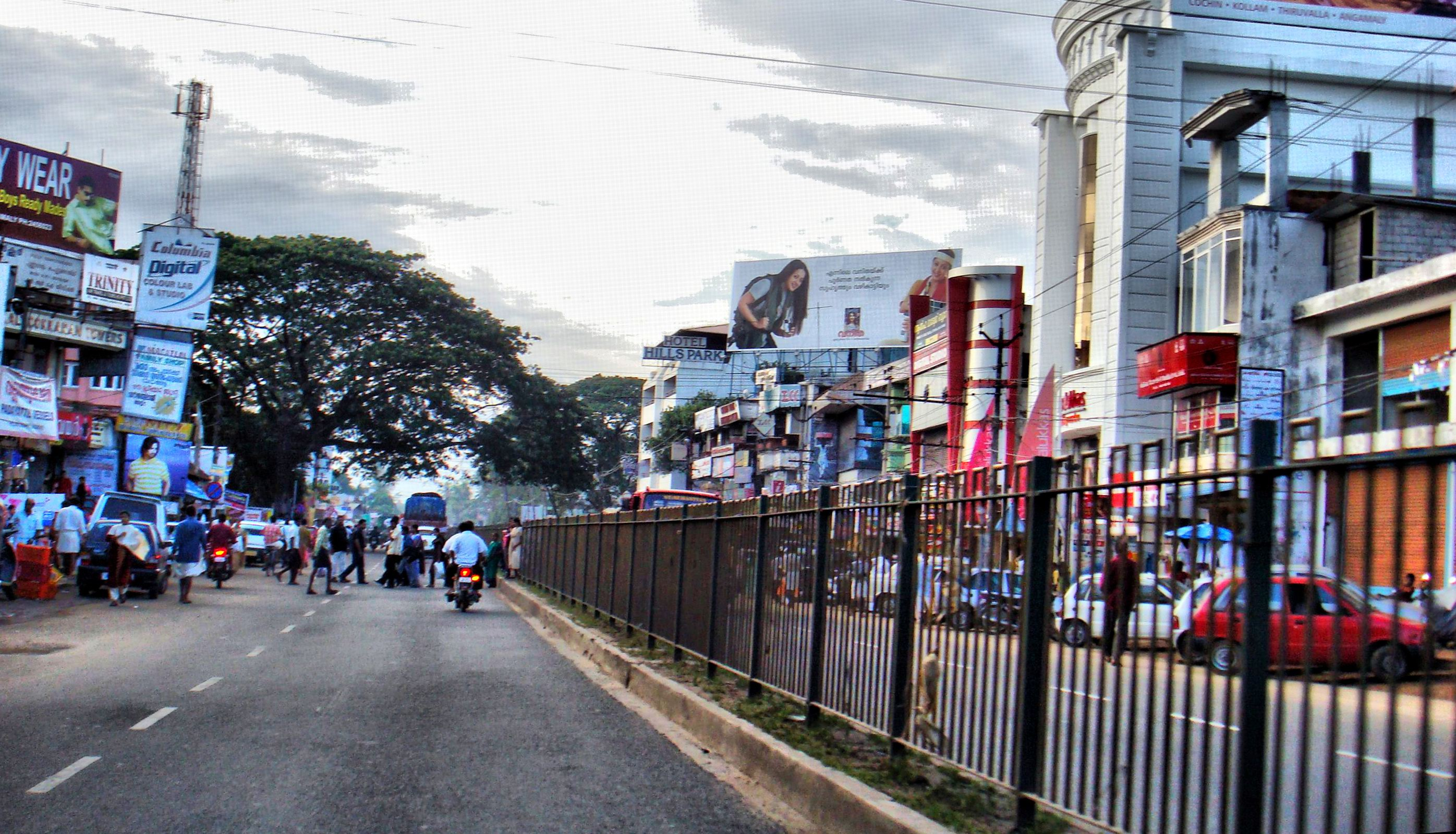 ഒരു ബുധനാഴ്ച എടുത്തത്. മഴ വരുന്നതിന് തൊട്ട് മുന്ന്.